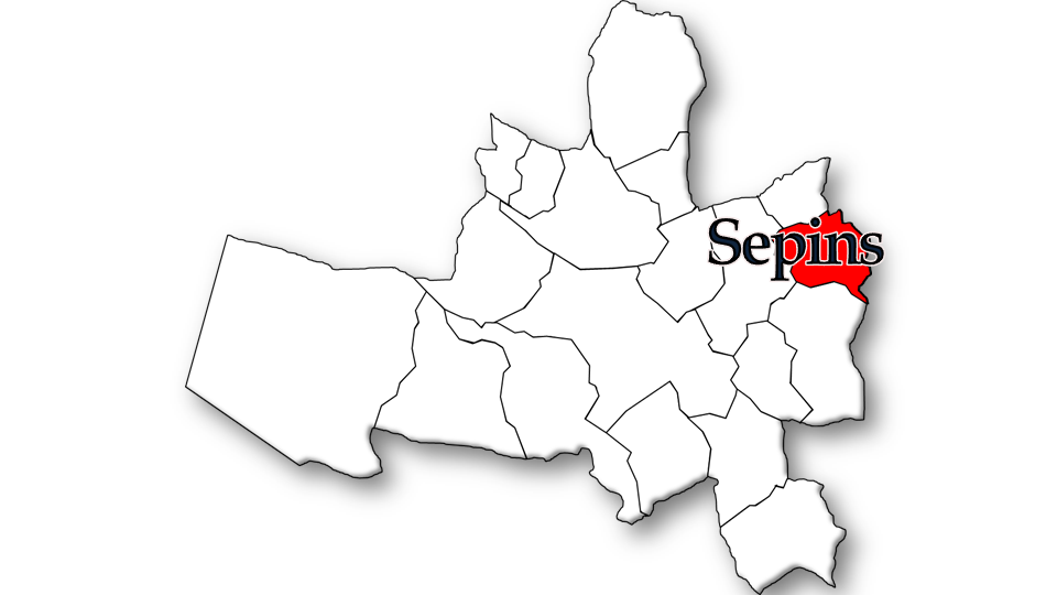 População